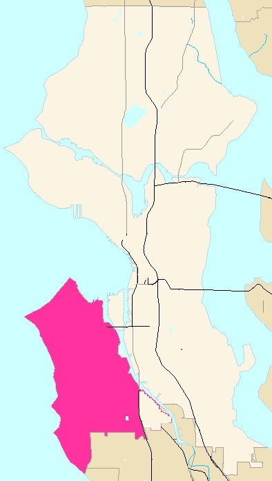 Adaptation of Seattle Map - West Seattle.JPG originally from enwiki, modified to exclude South Park, in accordance with the "SW = West Seattle" understanding of West Seattle's boundaries.